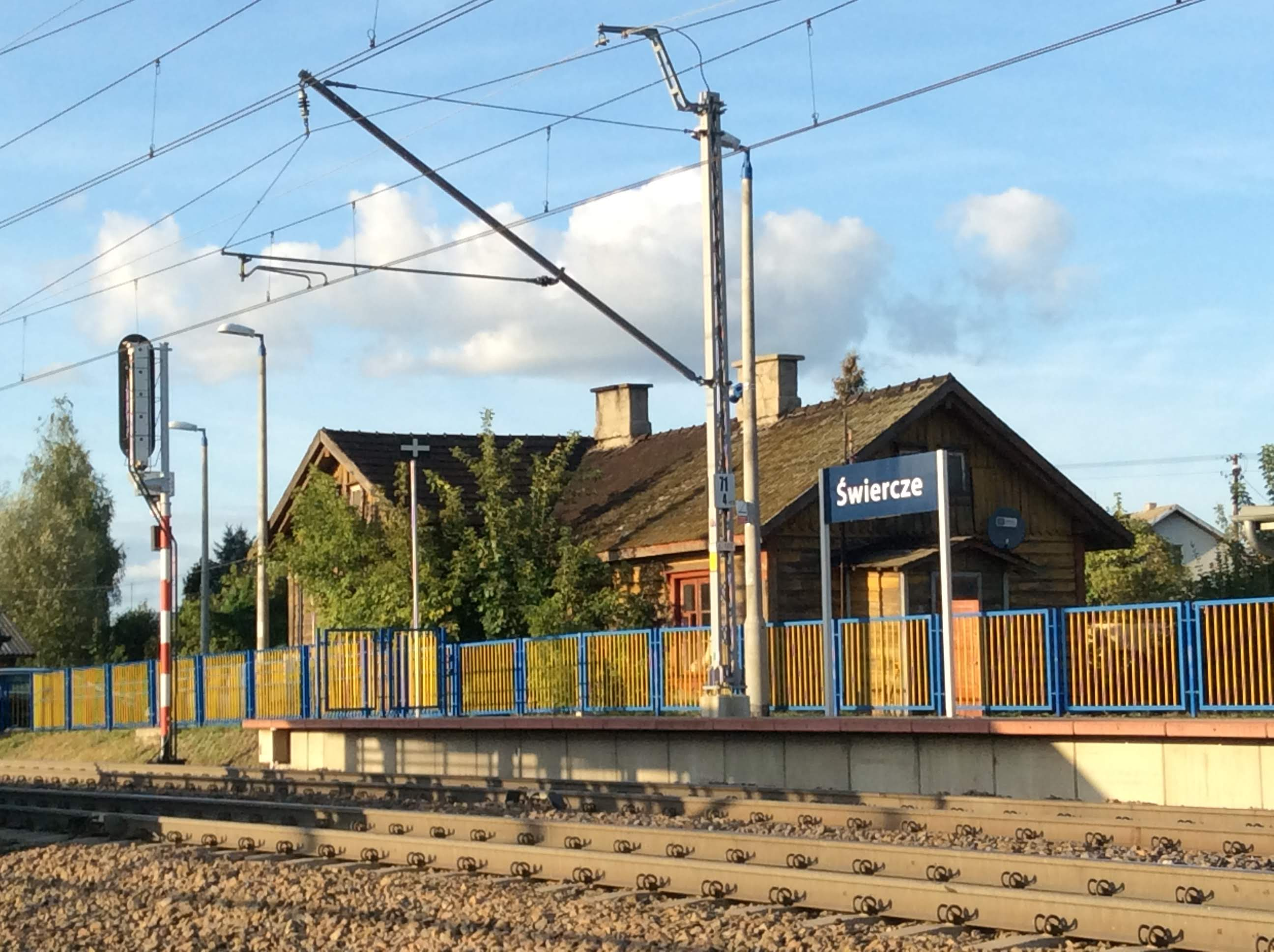 Świercze - stacja kolejowa